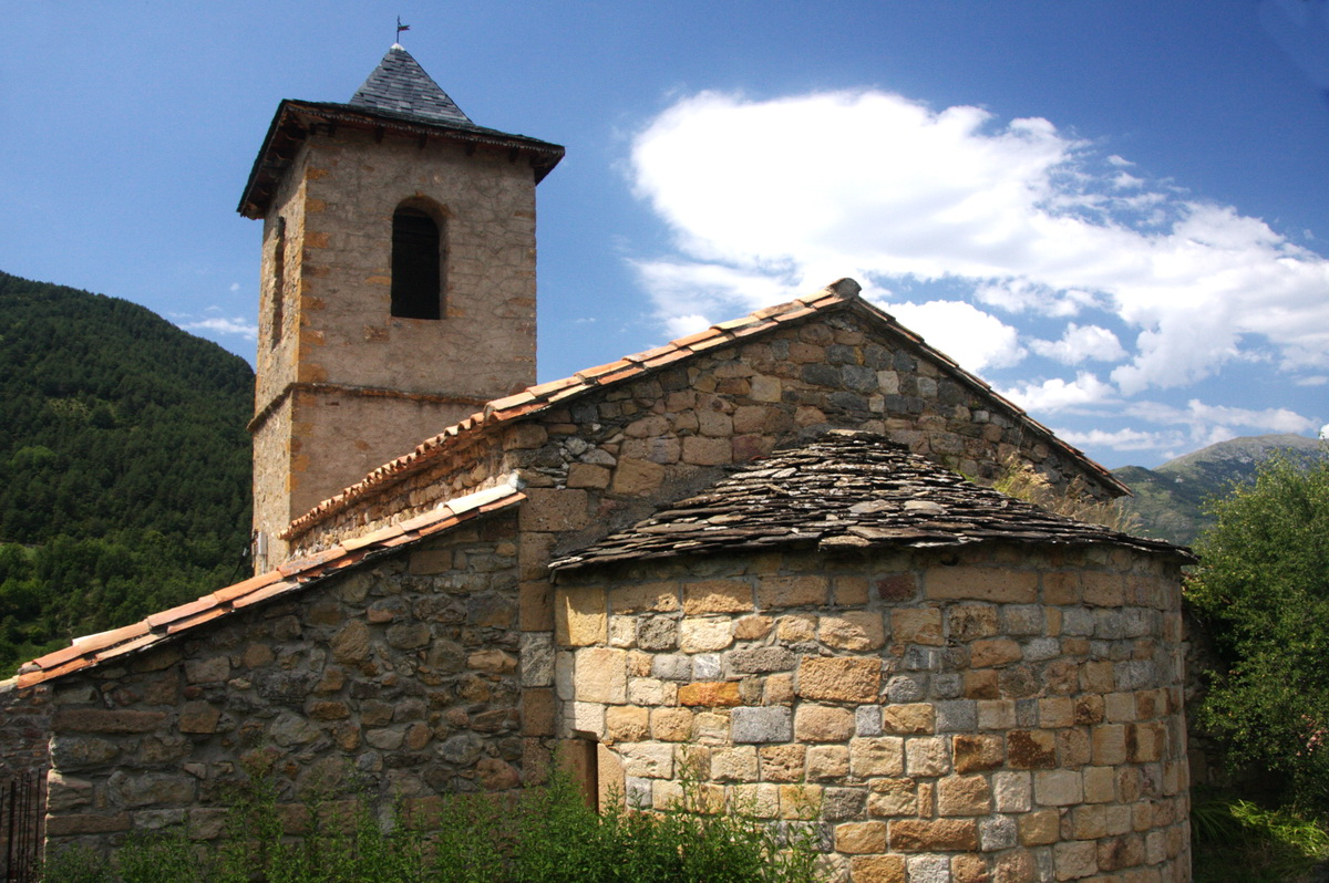 Església de Sant Jaume a Gavàs(Bisaurri-la Franja-Osca)